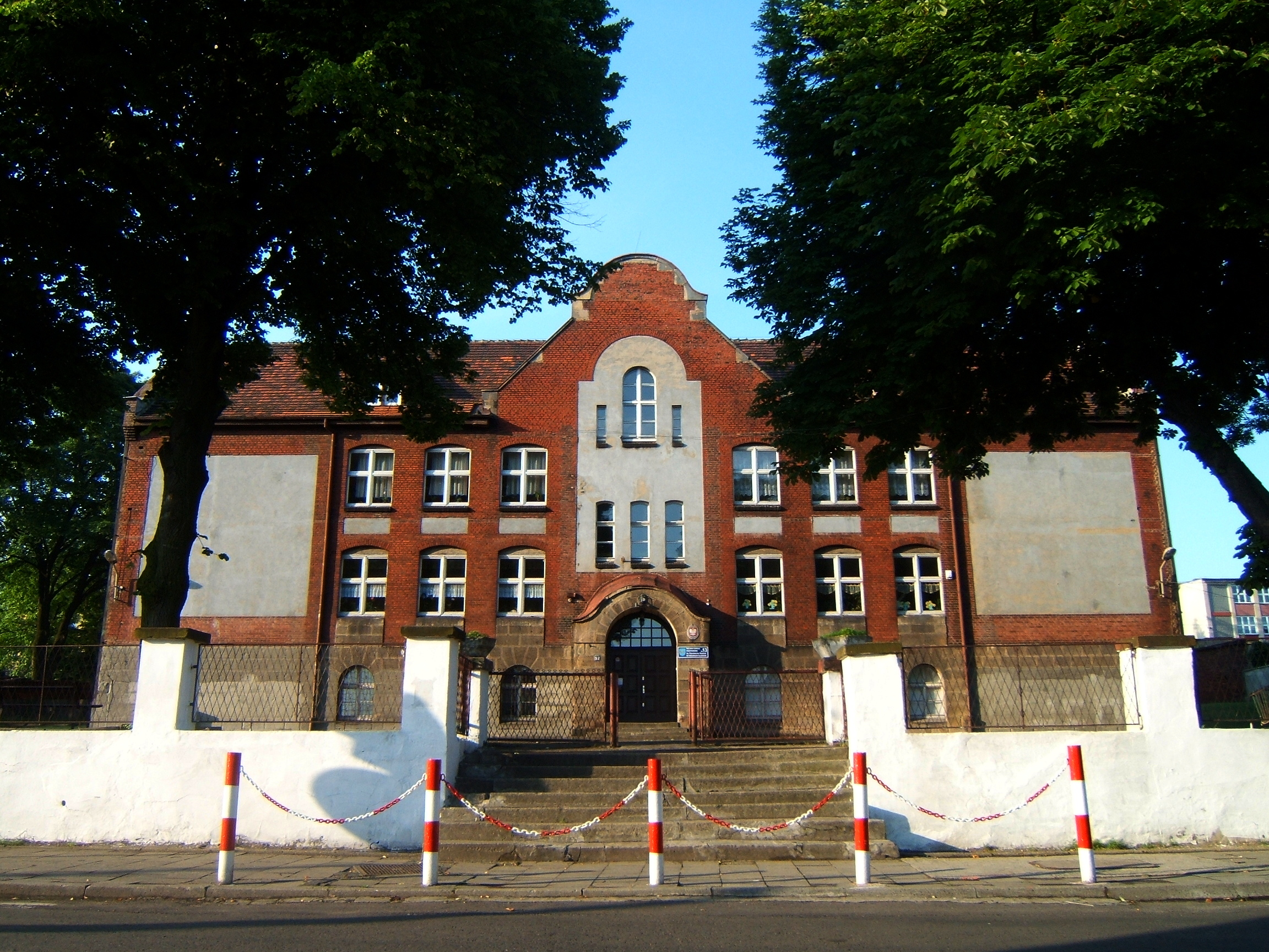 Miejska Szkoła Podstawowa nr 13 imienia Powstańców Śląskich w Piekarach Śląskich, Polska